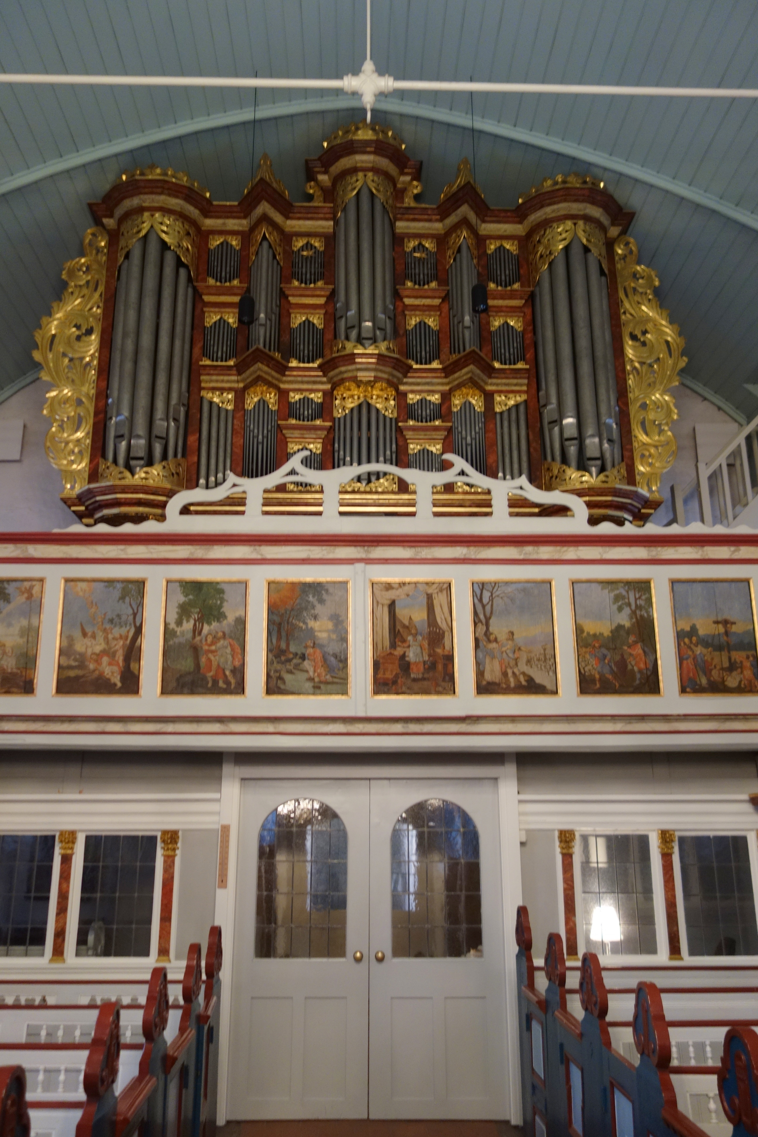 St. Pankratius Hamburg-Ochsenwerder, Deutschland